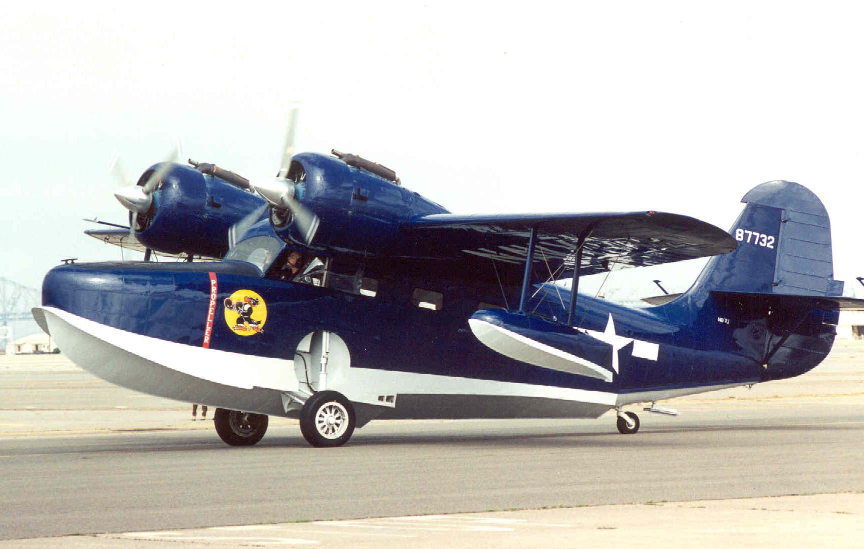 JRF5n87Utaxi